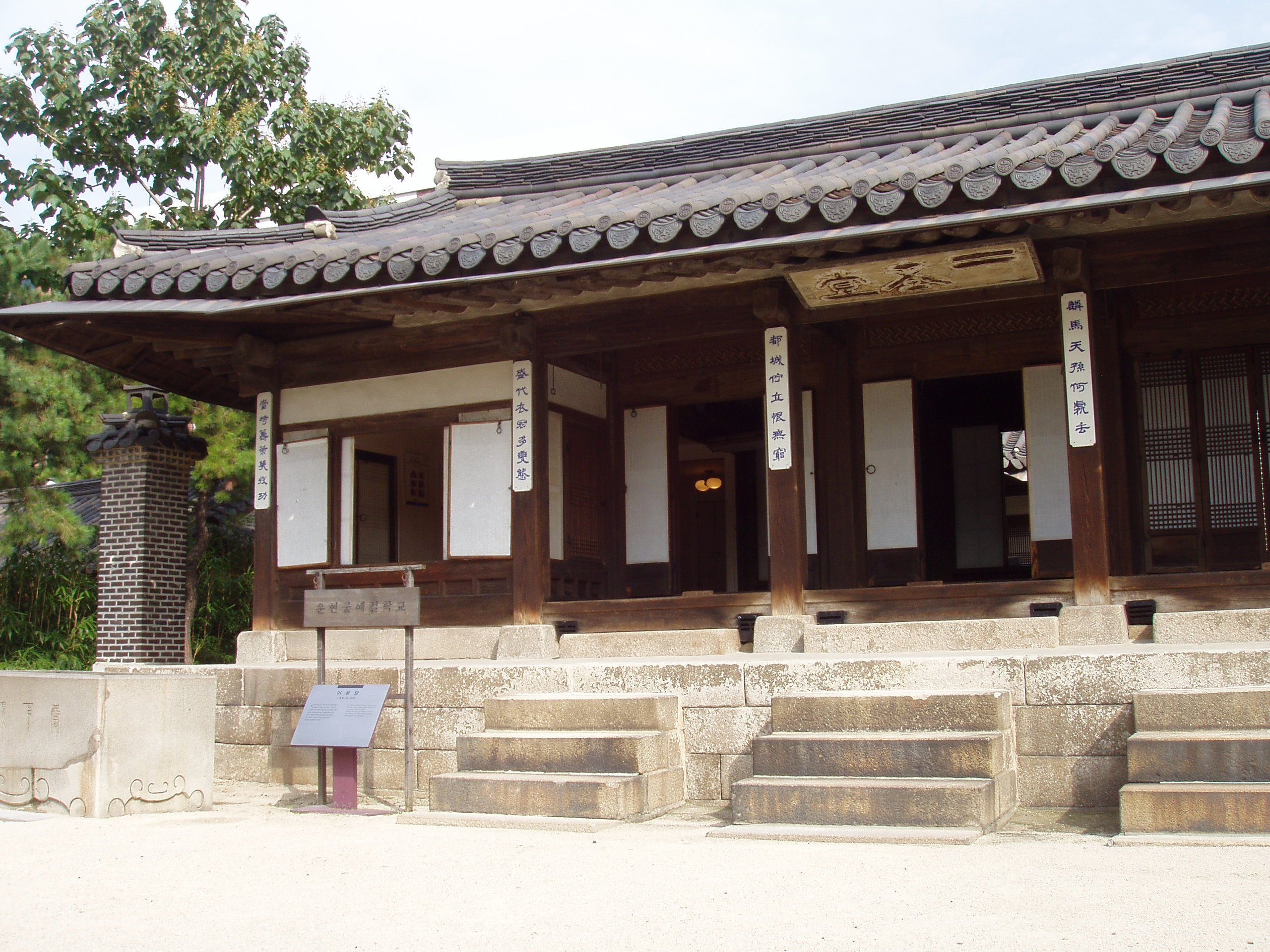 Iro-dang, Unhyeongung - Seoul, Korea.